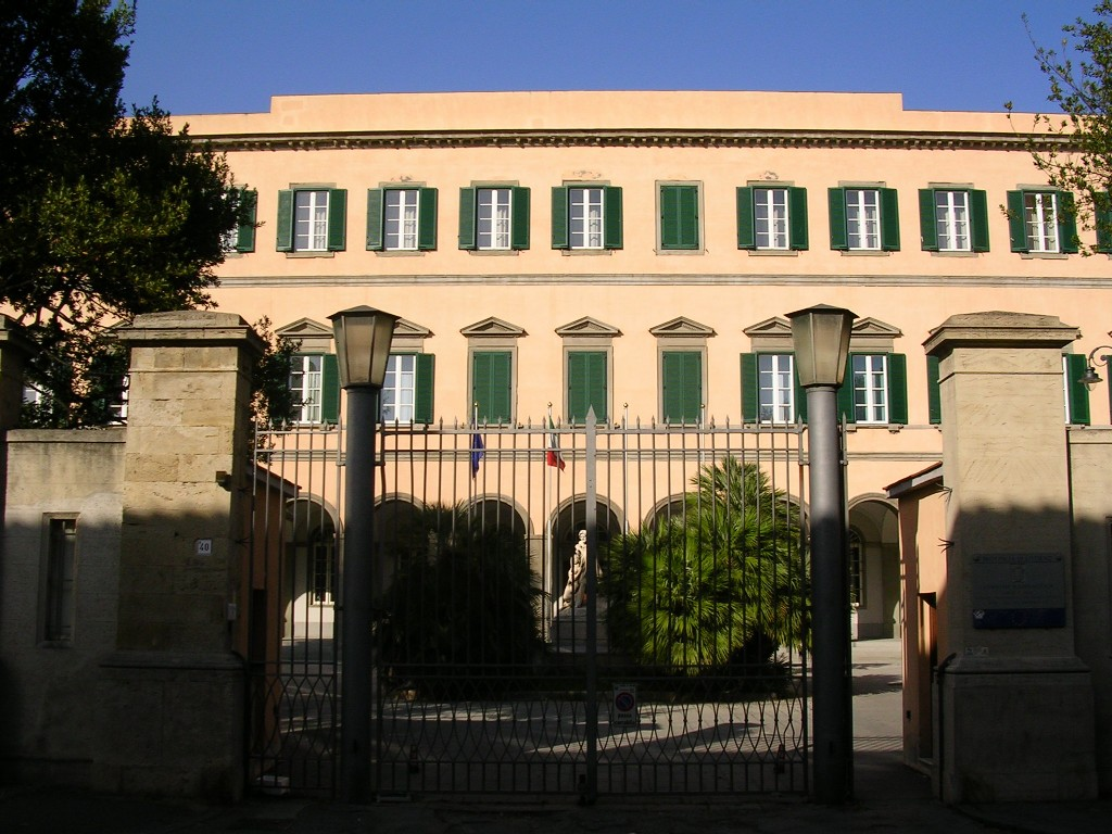 Livorno: Pia Casa di Lavoro (XIX secolo), ora nota anche col nome di Complesso "A. Gherardesca".